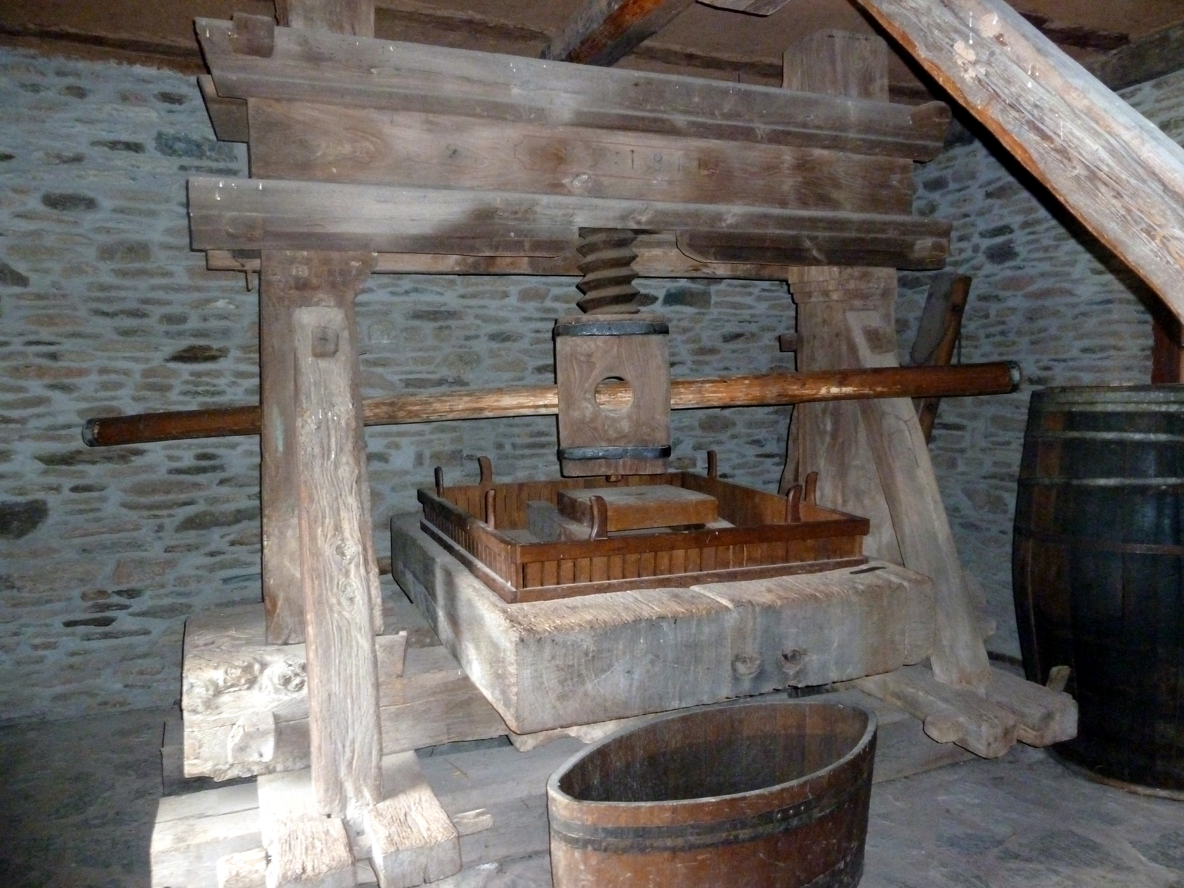 Rheinland-Pfälzisches FREILICHTMUSEUM Bad Sobernheim – Kelter im Haus Bruttig